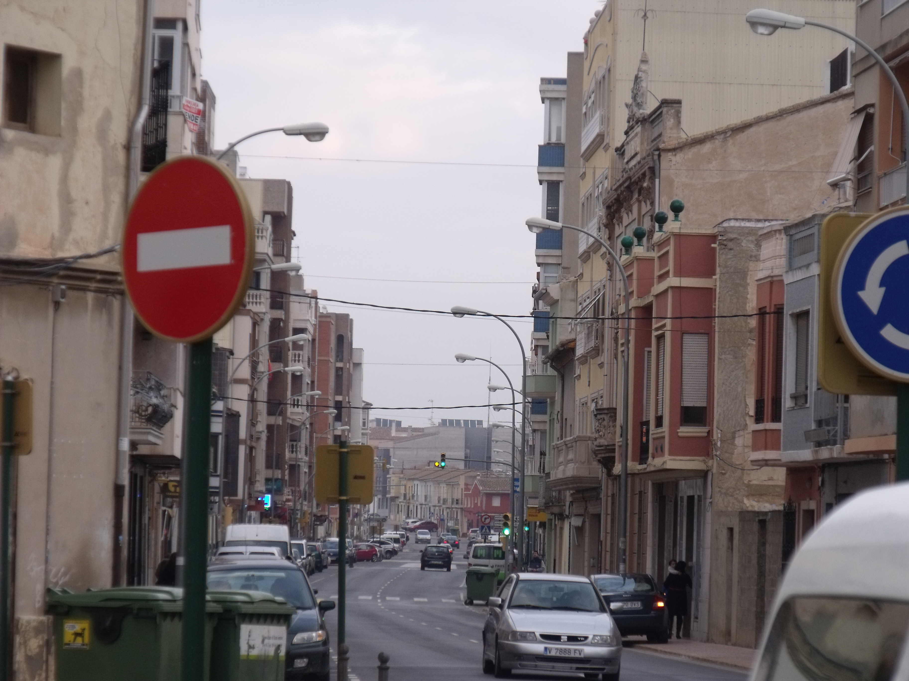 Carree Major d'Almussafes.